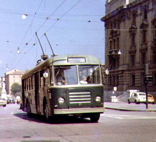 Ancona, vettura filoviaria 21 (tipo Fiat 2401 Cansa) in largo XXIV Maggio